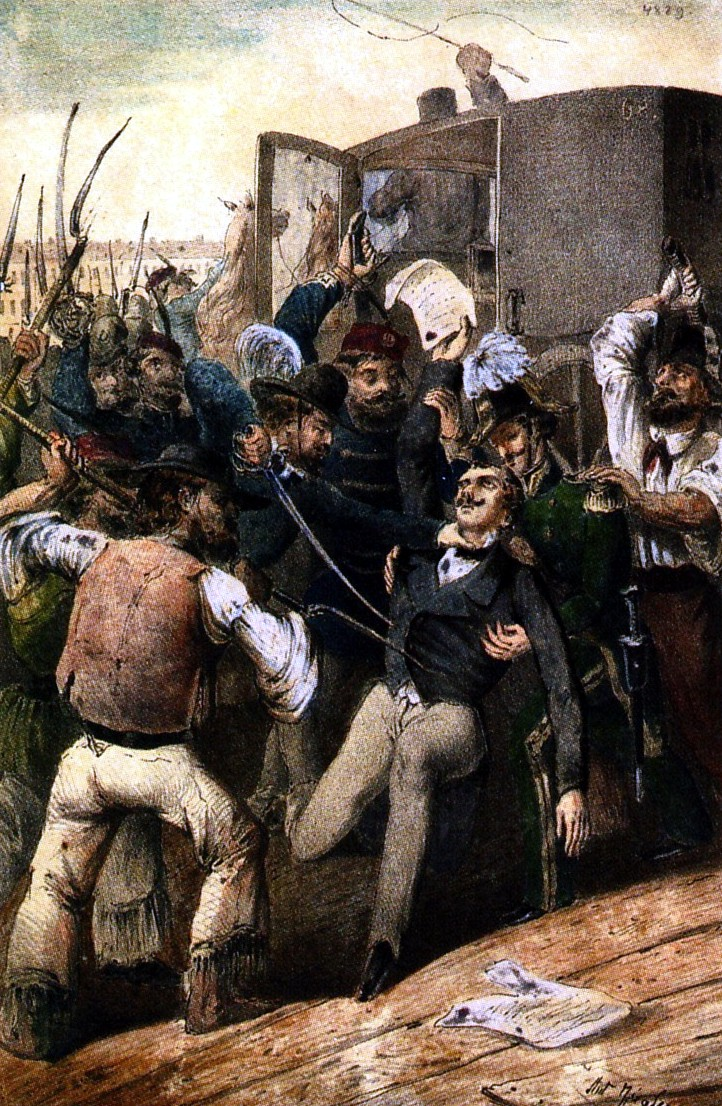 Assassination of Franz Philipp von Lamberg in Buda-Pest, September 28, 1848label QS:Len,"Assassination of Franz Philipp von Lamberg in Buda-Pest, September 28, 1848"label QS:Lhu,"Lamberg Ferenc meggyilkolása a Pest-Budai hajóhídon 1848. szeptember 28-án."